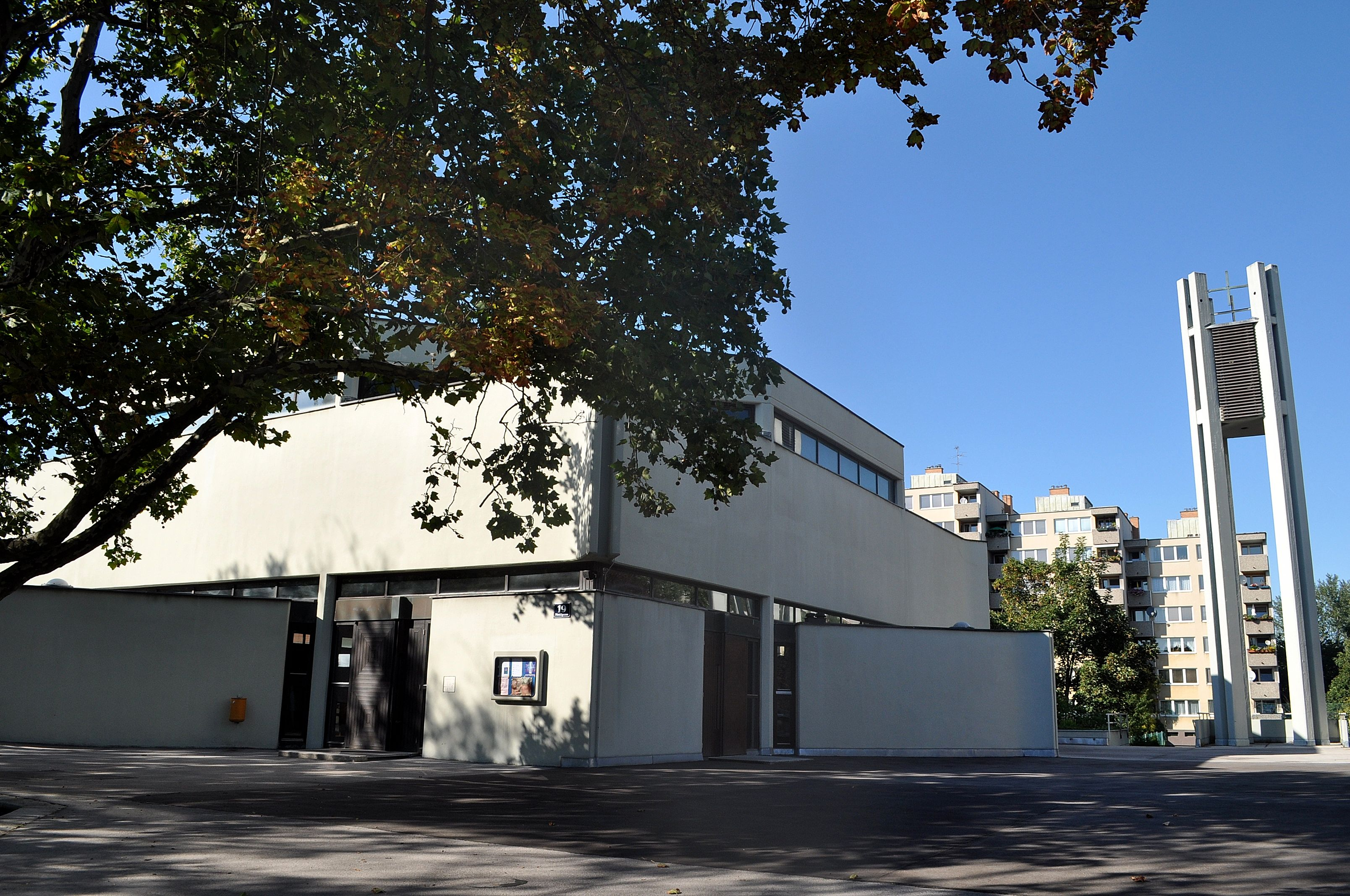 Kath. Pfarrkirche, hl. Klemens Maria Hofbauer - Wien 11, Meidlgasse 19